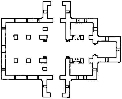 date du cliché : mars 2001